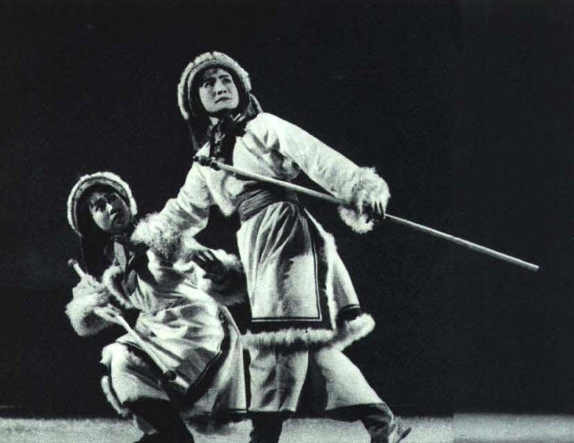 1964-08 1964年 草原英雄小姐妹